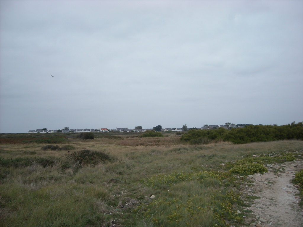 Vue du village depuis le sud de l'île